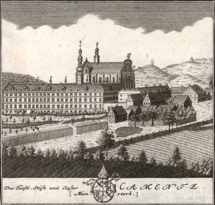 Fürstliches Stift und Kloster Kamenz (Kamieniec Ząbkowicki)